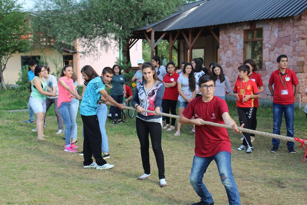 Պարանի ձգման խաղ, Վիքիճամբար 2016